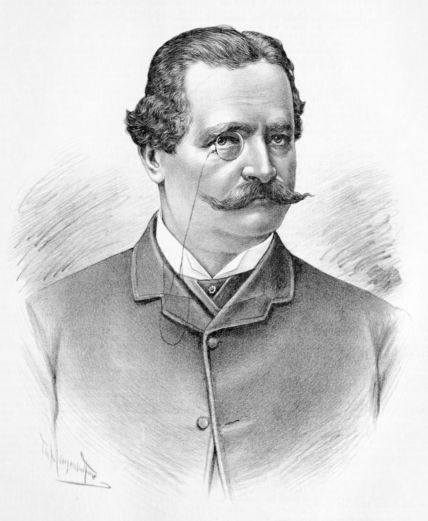 Karl Ferdinand Ritter Mautner von Markhof (1834–1896), Austrian entrepreneur